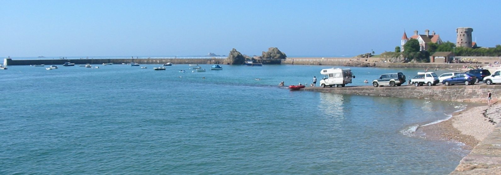 La Rocque, Grouville, Jersey